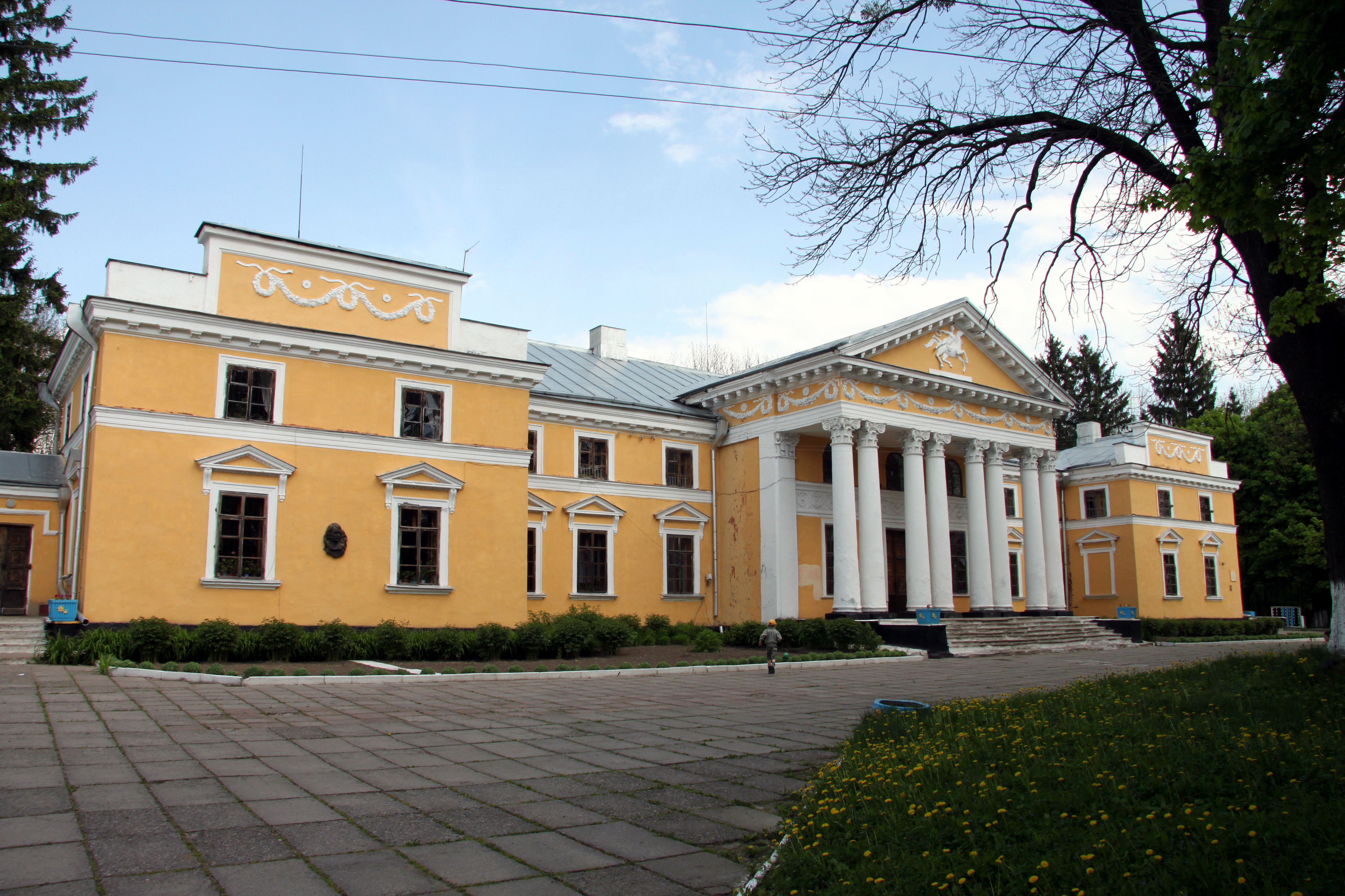 Садиба Ганських (мур.):, с.Верхівня